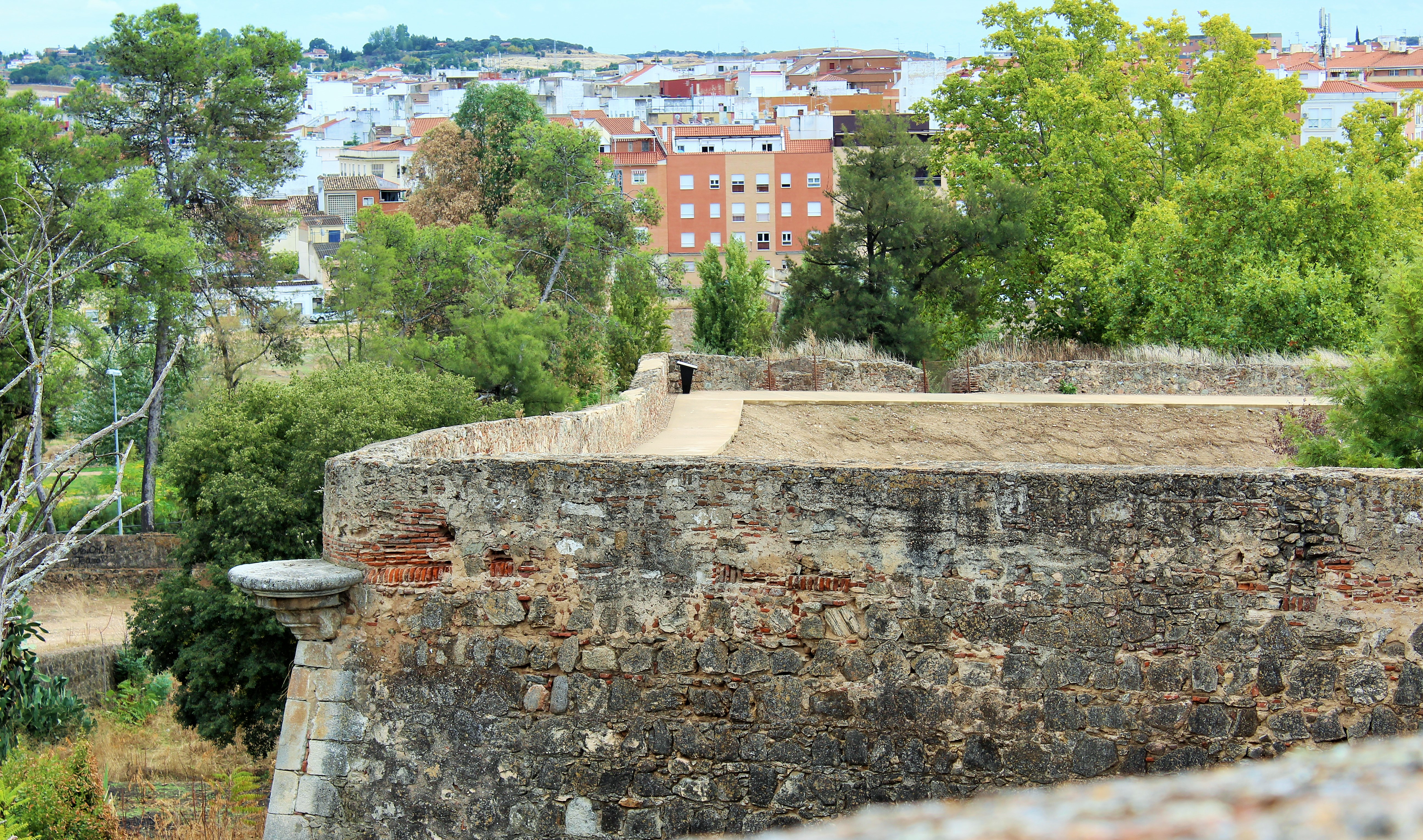 Muralla con vértice saliente y peana de garita.